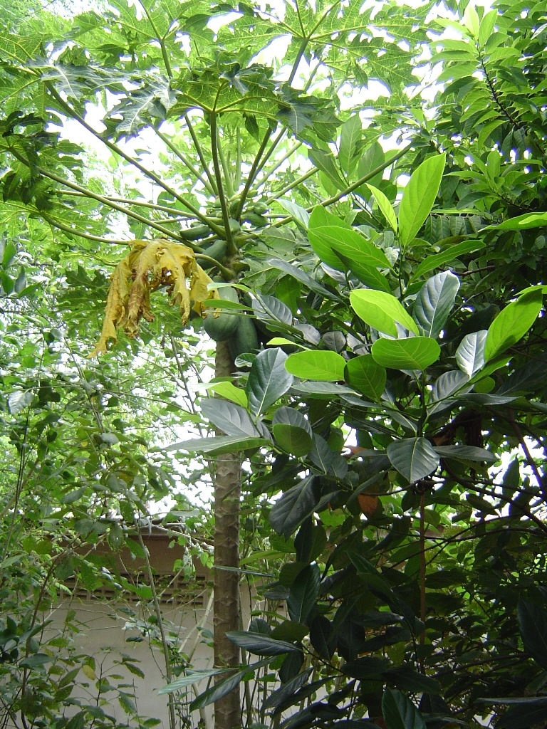 Papayabaum mit Früchten, Isaan, August 2004